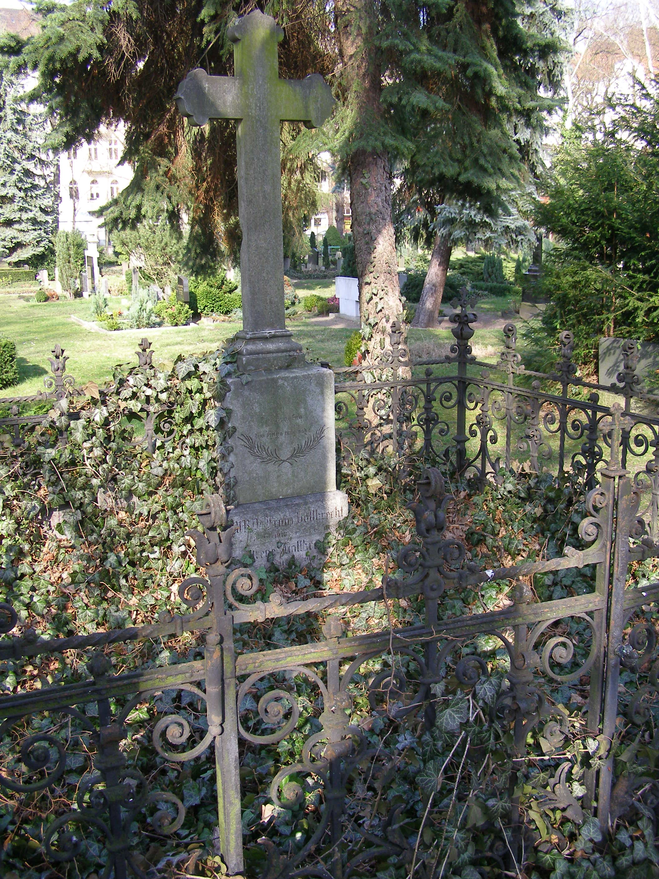 Dreifaltigkeitsfriedhof II (Friedhof in / cemetery in: Berlin, Kreuzberg, Bergmannstraße) Grab / tomb Vollbrecht